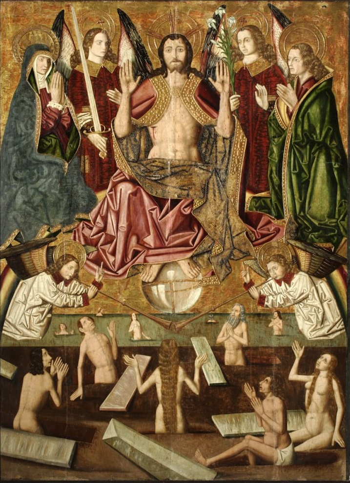 La obra representa el Juicio Final, hallándose Jesucristo sentado en el trono que ocupa el centro de la composición.